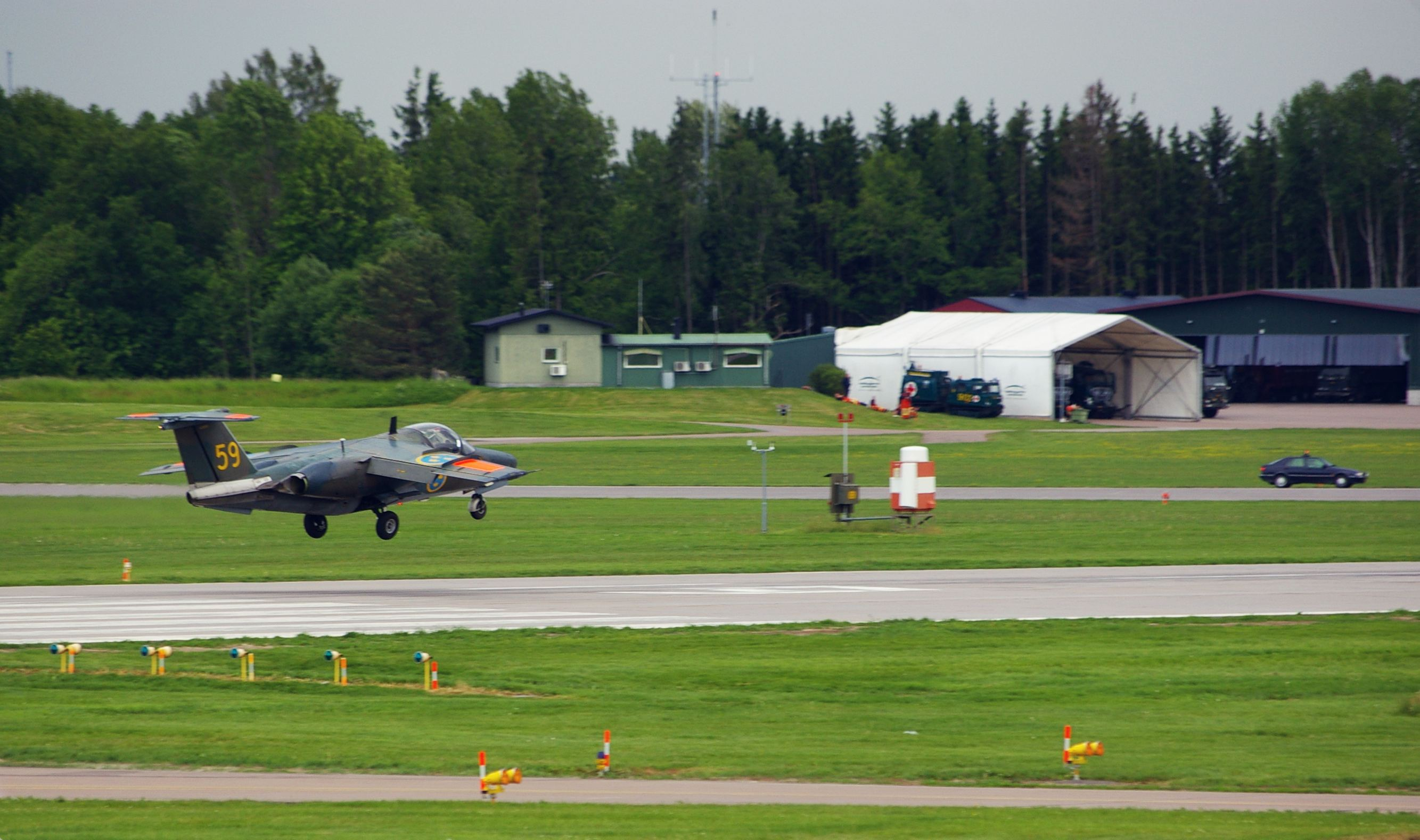 SK60/SAAB 105 som lander på Malmen.